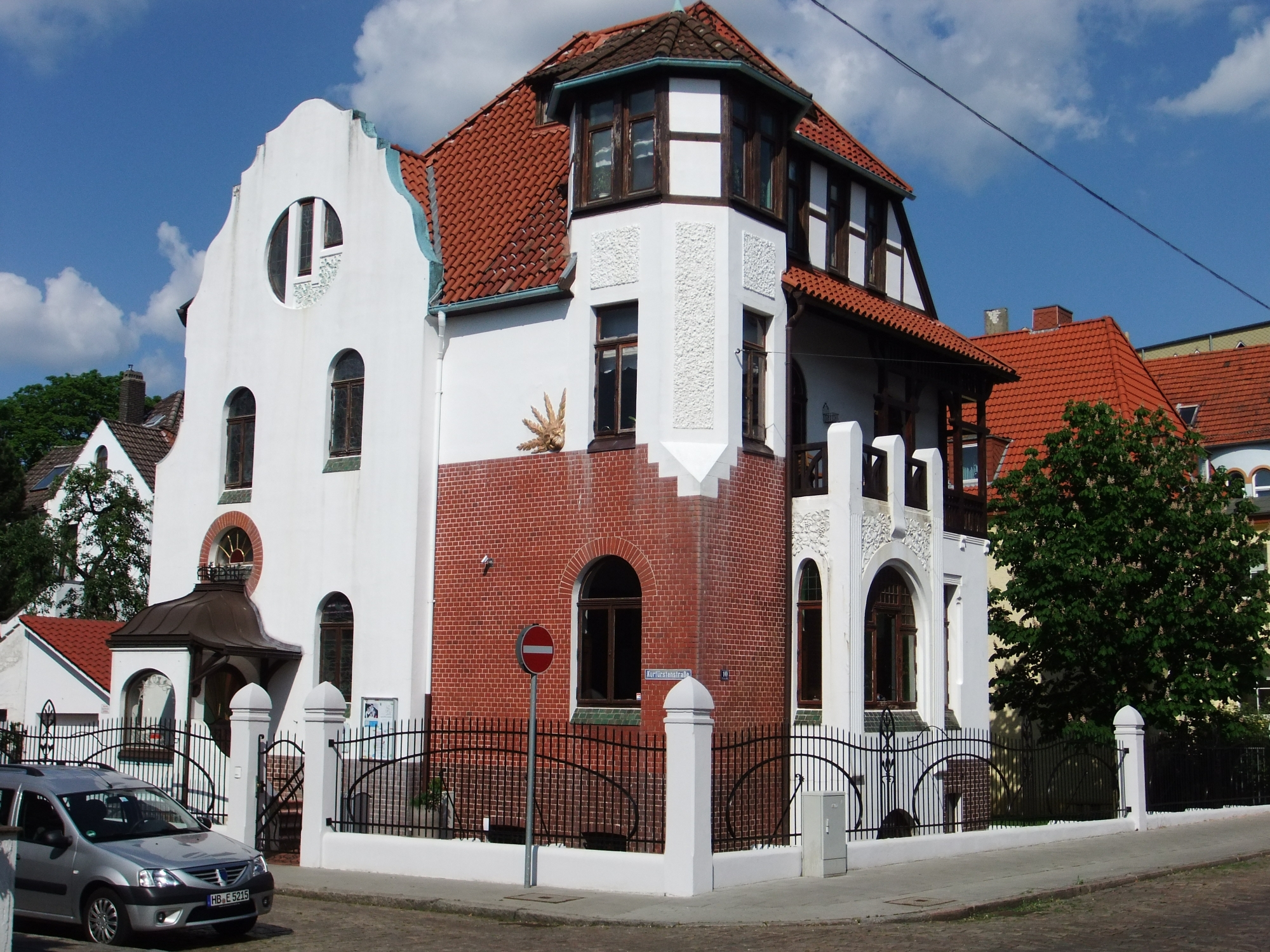 Villa Rabien in Bremerhaven, An der Allee 10. Das abgebildete Objekt ist ein geschütztes Kulturdenkmal in der Freien Hansestadt Bremen, mit der Nr. 1555 beim Landesamt für Denkmalpflege registriert.